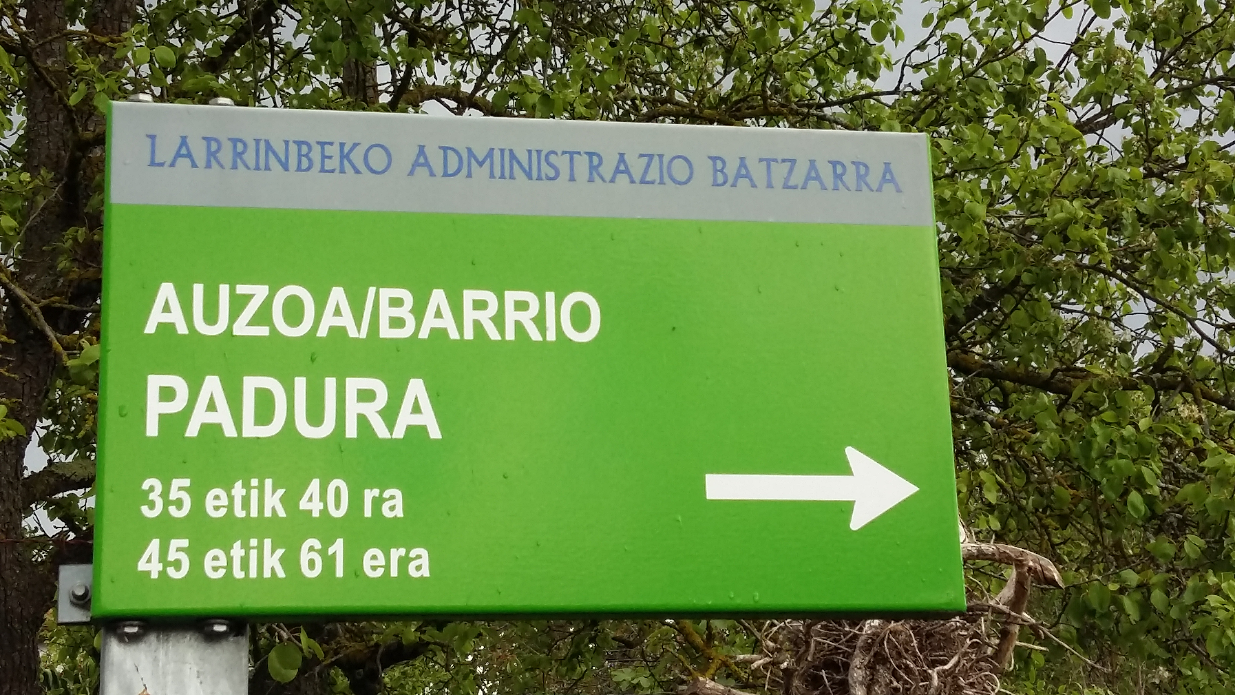 Señal del barrio en Larrinbe